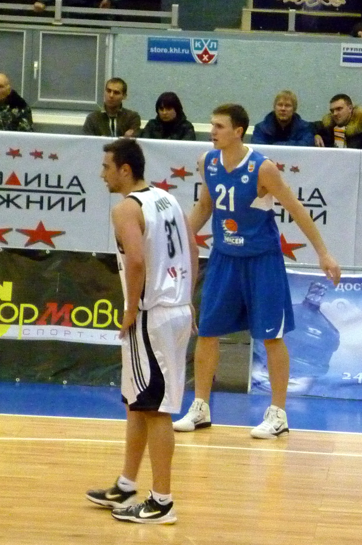 Pavel Gromyko (blue) and Ivan Paunic (white)